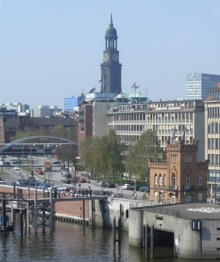 Vorsetzen Blick über den Binnenhafen, Hamburg-Altstadt. Vorne das Nikolaisperrwerk am Kajen mit der Mündung des Nikolaifleetes in den Zollkanal. Im Hintergrund die St. Michaeliskirche.